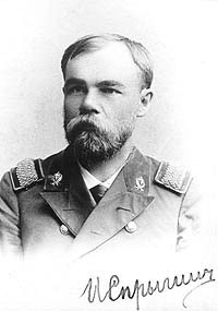 Иван Иванович Спрыгин, ботаник, исследователь природы Среднего Поволжья, Пензенской области, Средней Азии и Казахстана, один из основоположников природоохранного дела в России. Доктор биологических наук, профессор.